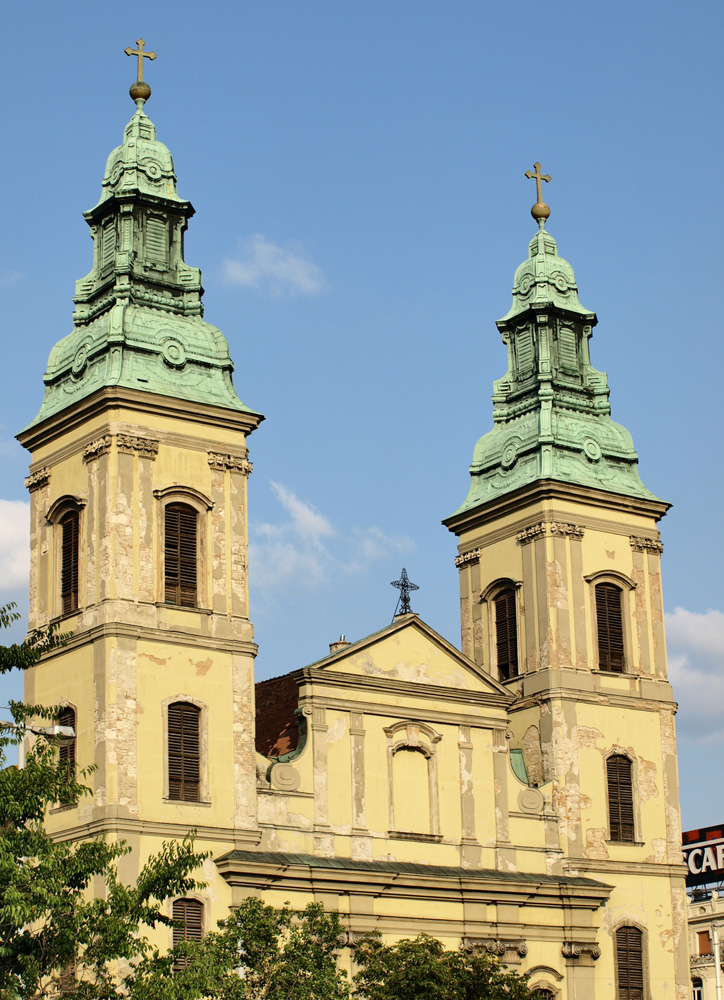 A belvárosi plébániatemplom, Budapest, Március 15-e tér